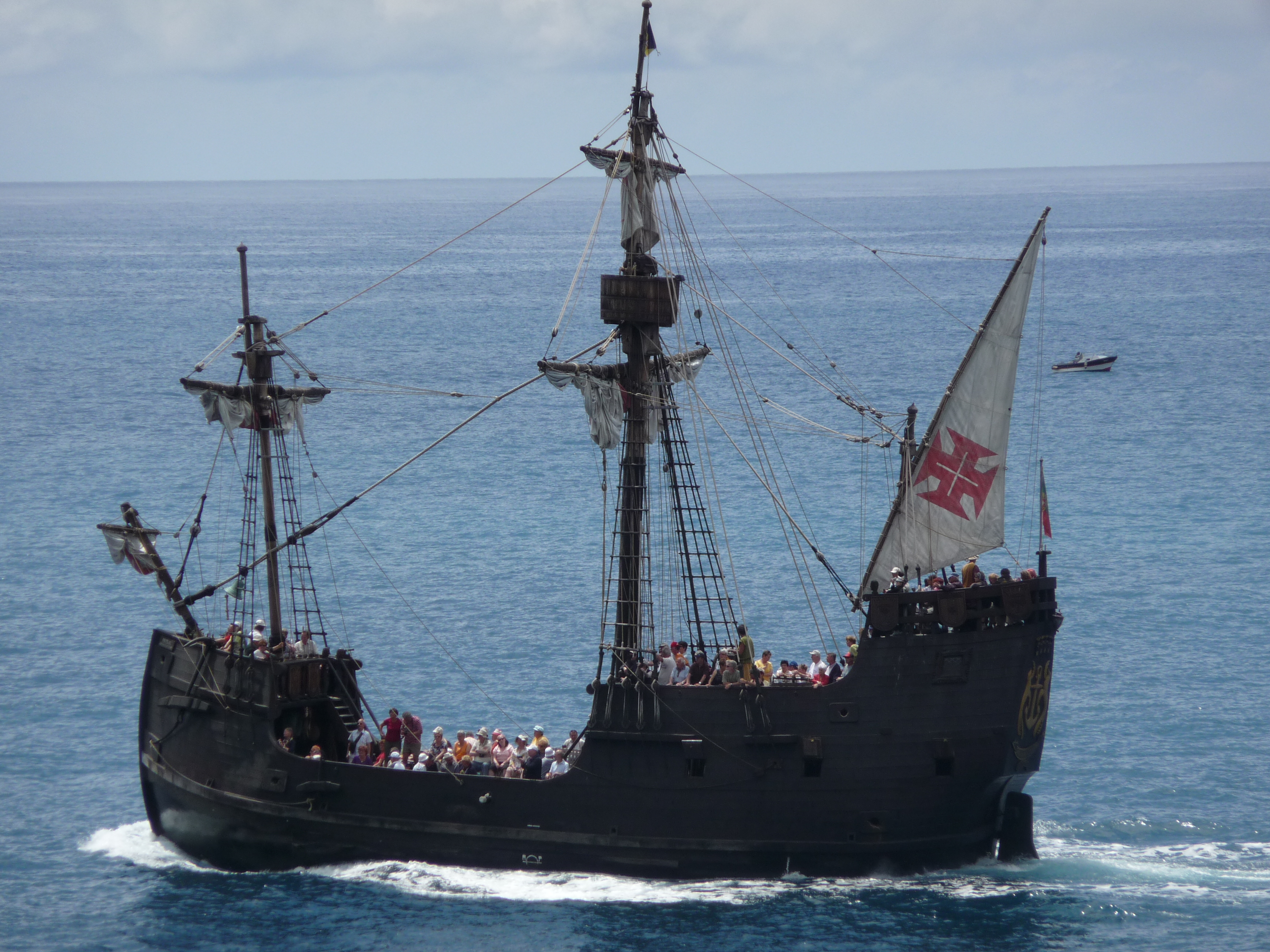 Funchal – Madeira wird entdeckt 5-09